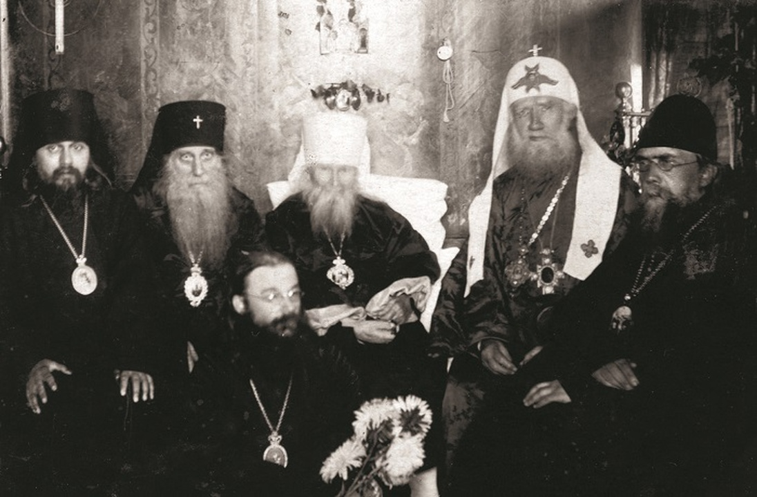 Патриарх Тихон в гостях у бывшего митрополита Московского и Коломенского Макария (Невского) в Николо-Угрешском монастыре. Рядом с ними (слева направо) священномученики: епископ Серпуховский Арсений (Жадановский), архиепископ Бийский Иннокентий (Соколов), с цветами - епископ Волоколамский Феодор (Поздеевский) и крайний справа - епископ Звенигородский Николай (Добронравов). Фотография.